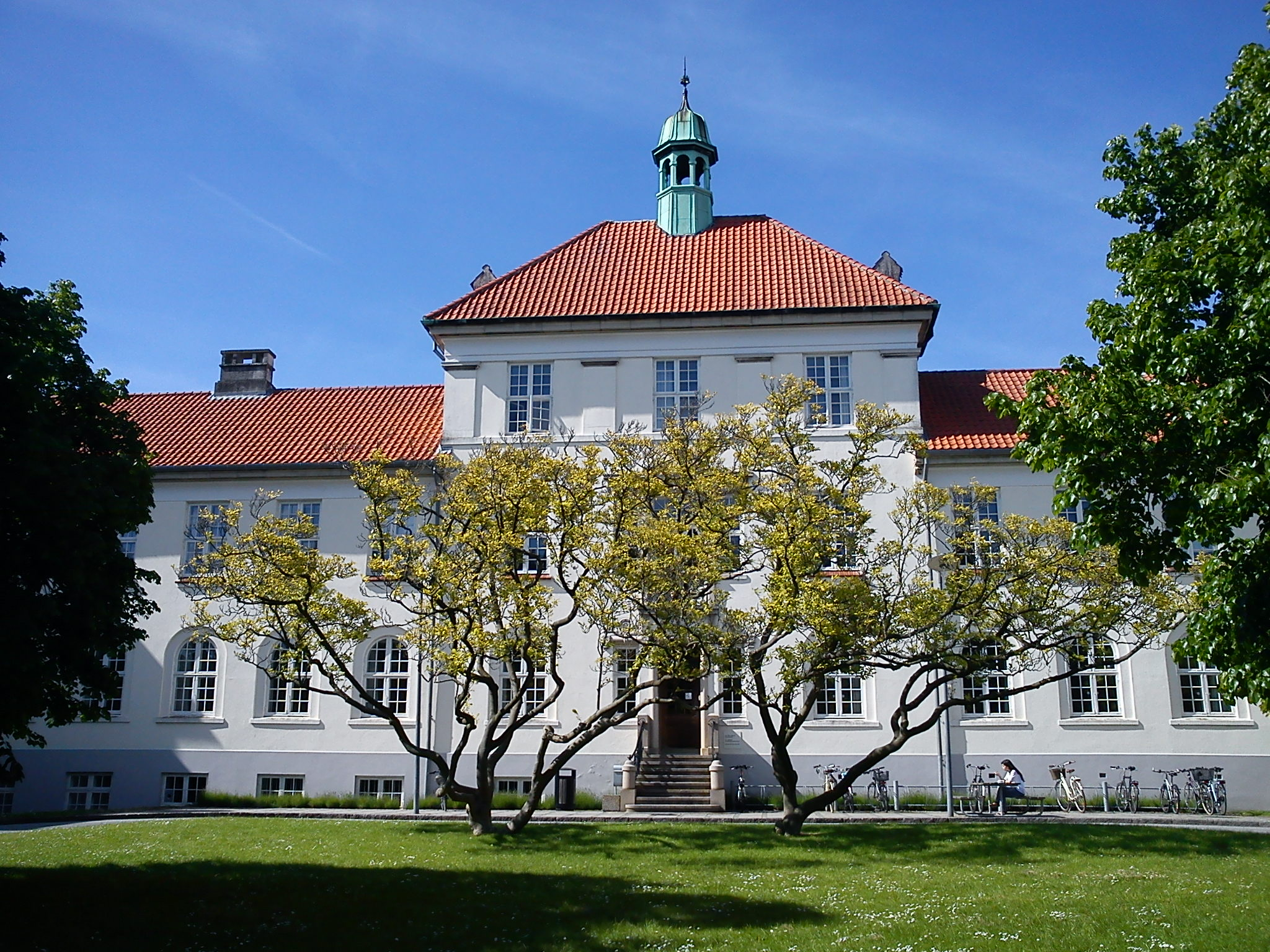 Victor Albeck Bygningen. Før år 2000 kendt som Fødselsanstalten i Jylland (FiJ). Bygningen er indviet i 1910 og Victor Albeck var anstaltens første leder.